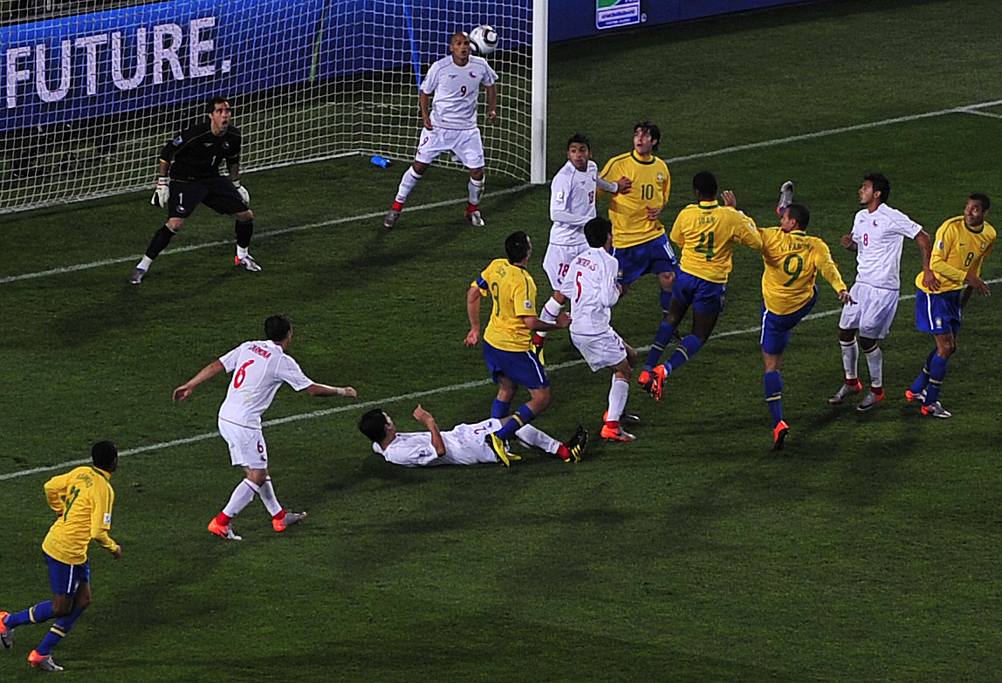 Joanesburgo - Com a vitória de 3 x 0 sobre o Chile, a seleção brasileira passa para as quartas de final da Copa do Mundo.